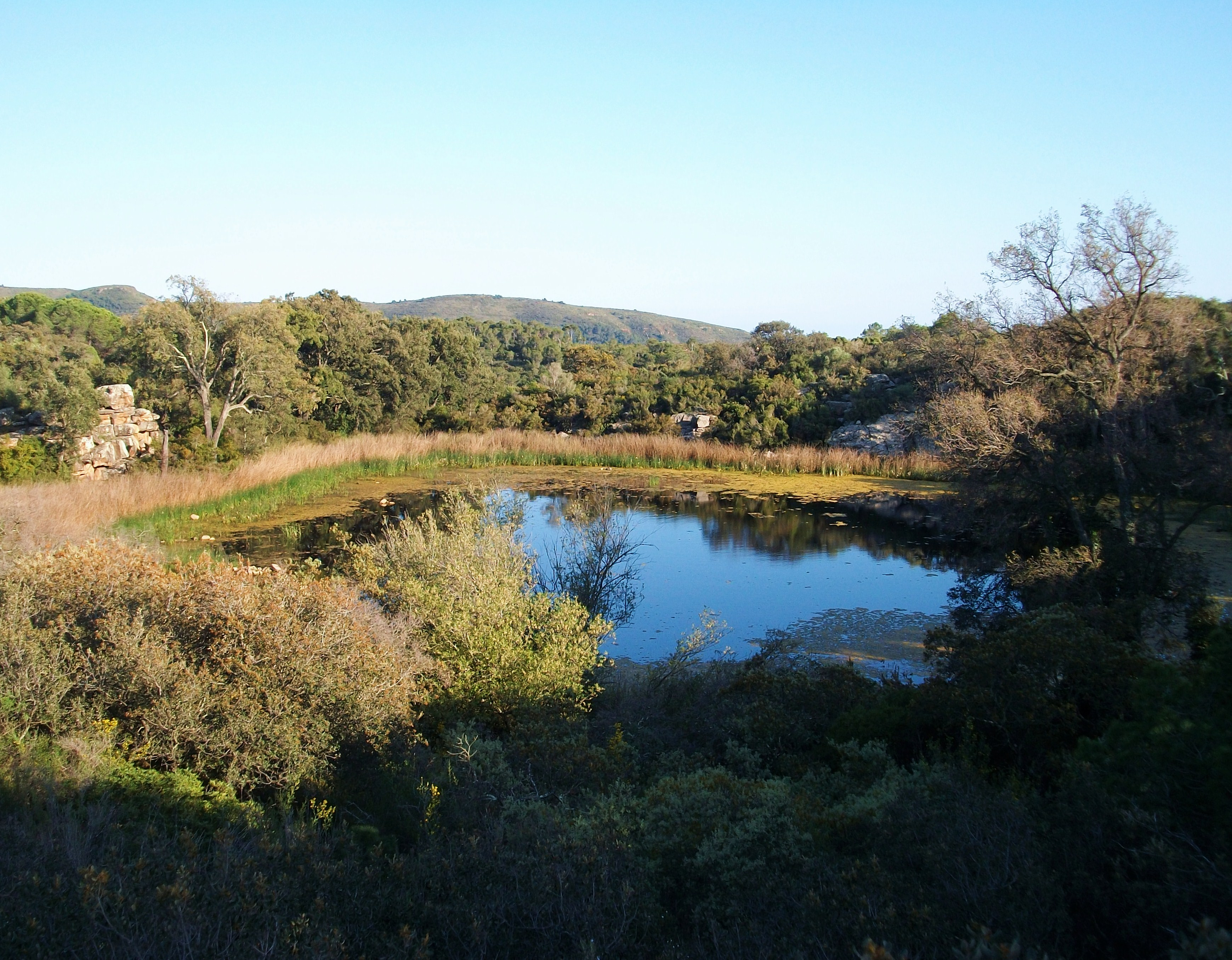 La llacuna de la Dehesa de Soneixa, Alt Palància, País Valencià.